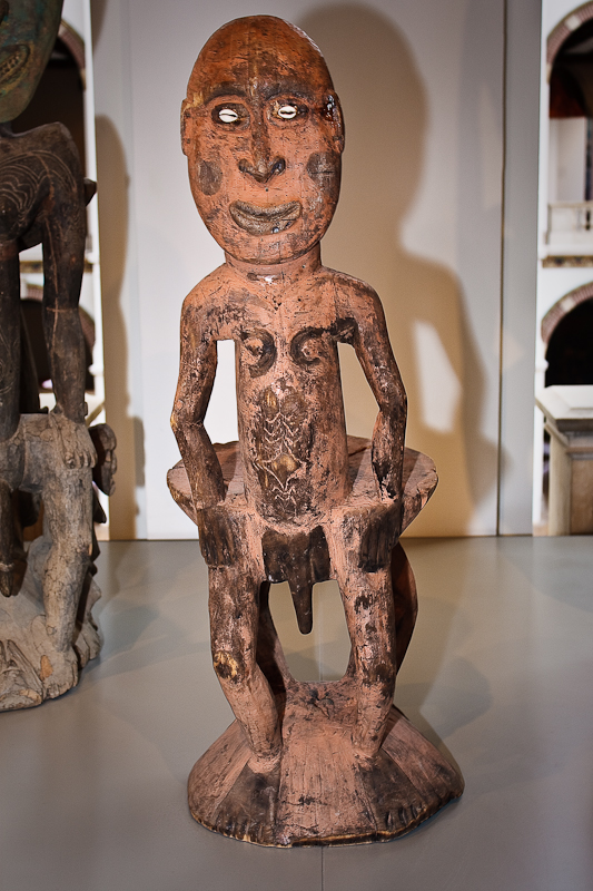 Sepik Redenaarsstoelen (2670-192A/2670-193/2670-194) Ceremoniële- of 'redenaarsstoel' met de voorstelling van 'Wagen', de belangrijkste geest van de gemeenschap en bovendien van de clan op wiens grond het mannenhuis was gebouwd. De stoel stond in het midden van het mannenhuis en was het centrum van clanvergaderingen. De sprekers zetten hun argumenten kracht bij door de zitting te bestrijken met bundels bladeren. Soms werden er offers op gezet. Op de stoel werd nooit gezeten. “Orator” stools or teket such as this are among some of the rarer items of the Middle Sepik culture, as there was usually only one appearing inside each village’s Tambaran men’s house, compared to the more abundantly produced shields or hook figures. According to Greub, 1985, in every men’s ceremonial house the orator stool stood at the center of the house, near the central post, and thus occupied an extremely important physical and spiritual position. It was a very important sculpture as it served to be the repository of the highest spirit of the community, the “wagen” spirit, and of the chief spirit of the specific clan of the ceremonial house it appeared in. Each orator stool was not constantly alive with these elevated spirits but rather served as temporary abodes. The wagen spirits were summoned and the orator stool was enlivened by particular ceremonies, and thus the house would be activated. All decisions concerning the village had to be discussed before the ceremonial chair, when a man spoke to the house, he would stand beside the chair and as he presented each idea he would place a coconut leaf upon the seat, or beat the seat with each argument in order to emphasize his ideas or opinions. Therefore, the stool was the center of village political life.